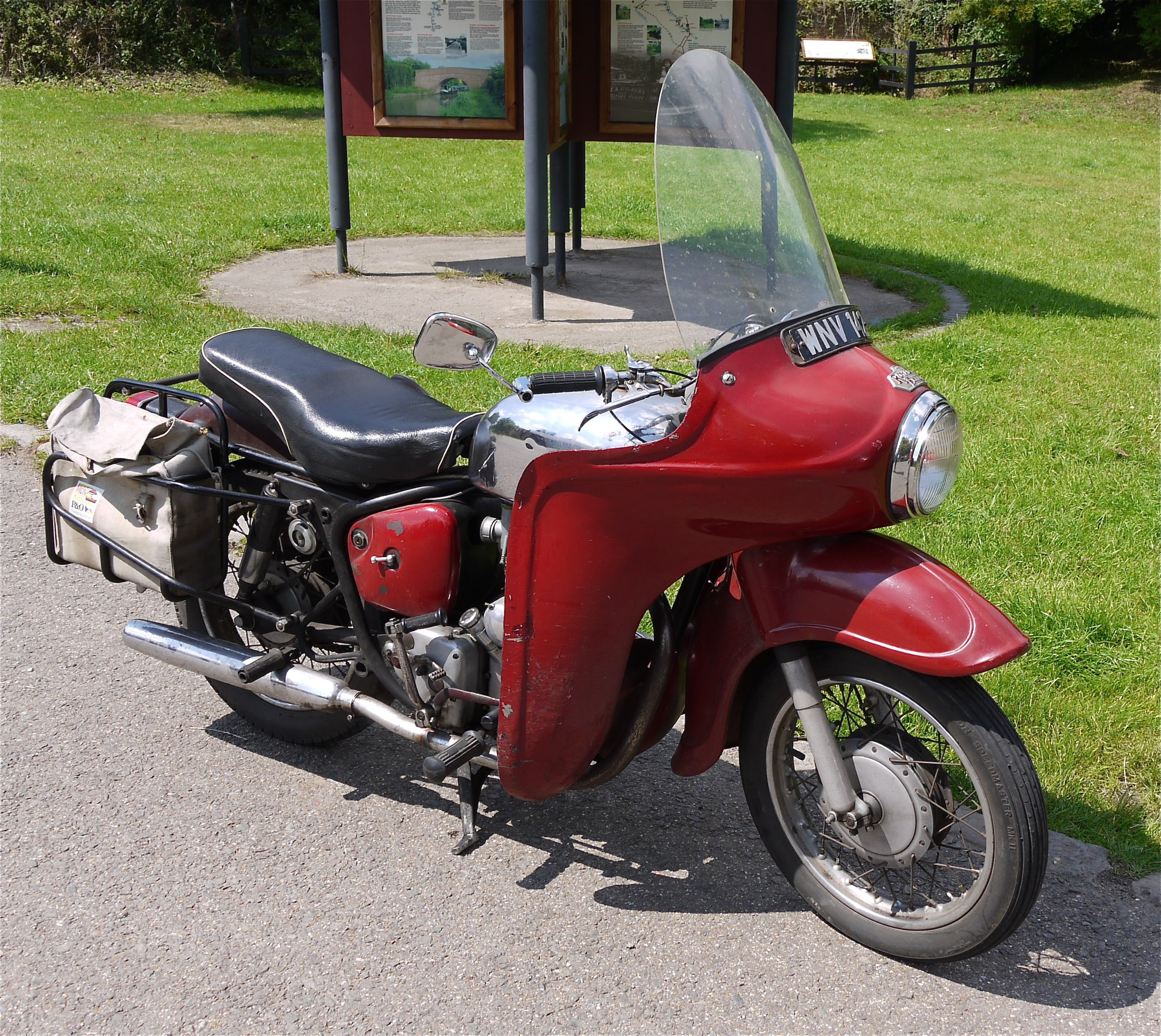 Panasonic G1 14-45 Lens iA mode